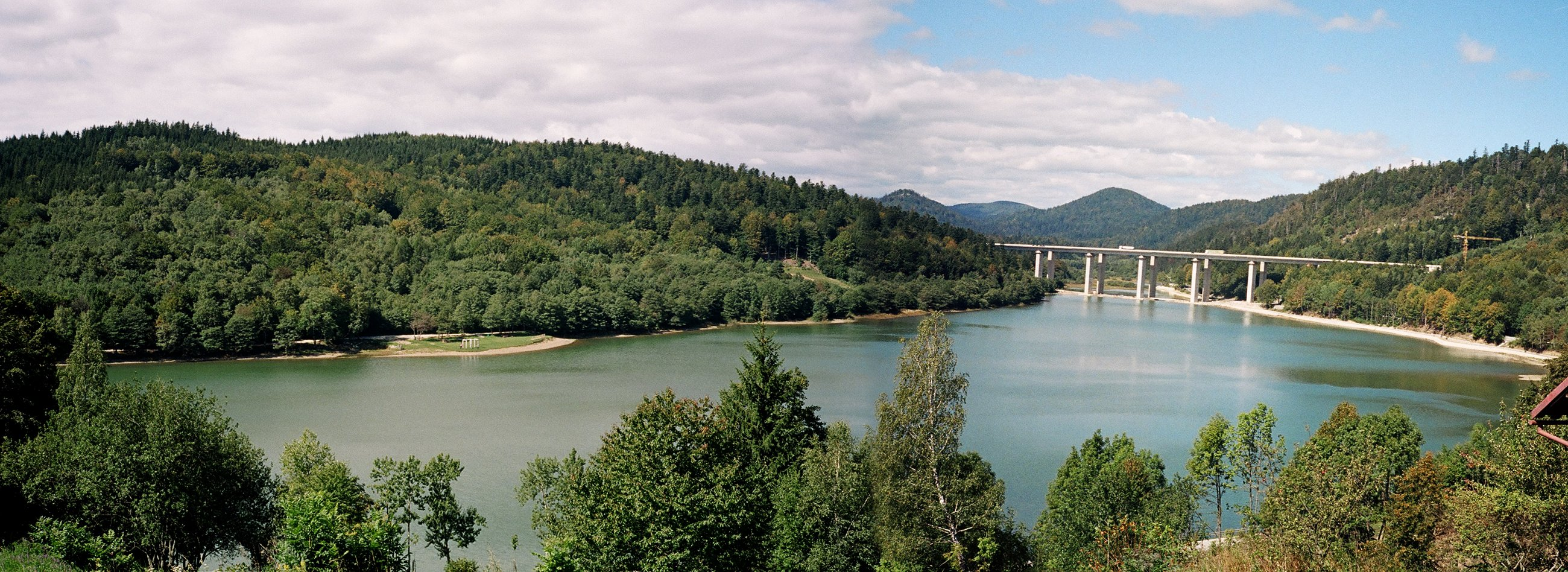 Bajersko jezero, viđeno iz Fužina. Desno su mostovi kojima preko jezera prelazi autocesta Rijeka-Zagreb.